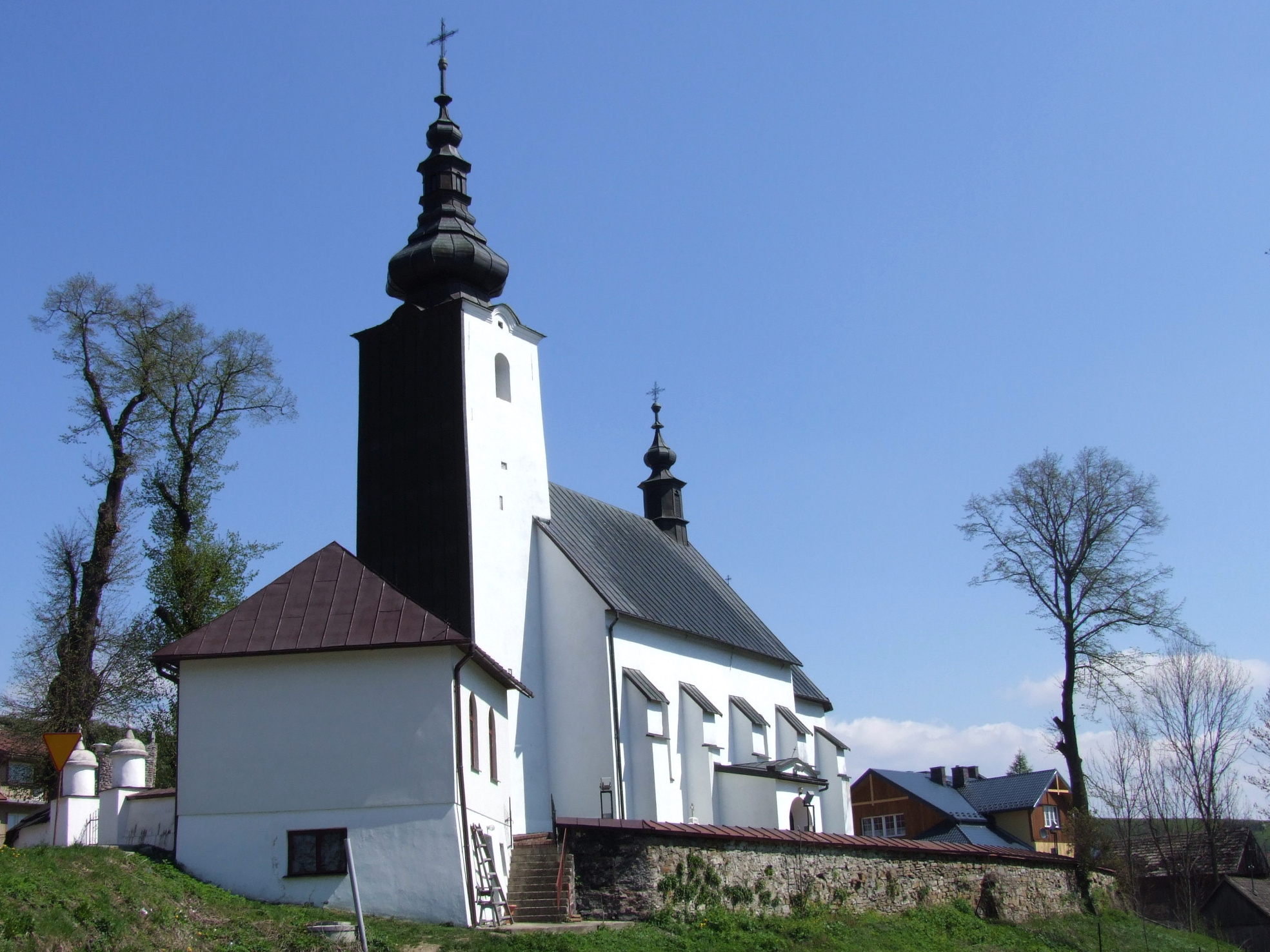 Łapsze Wyżne - kościół p.w. Apostołów Piotra i Pawła